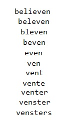 variant letterwisselspel